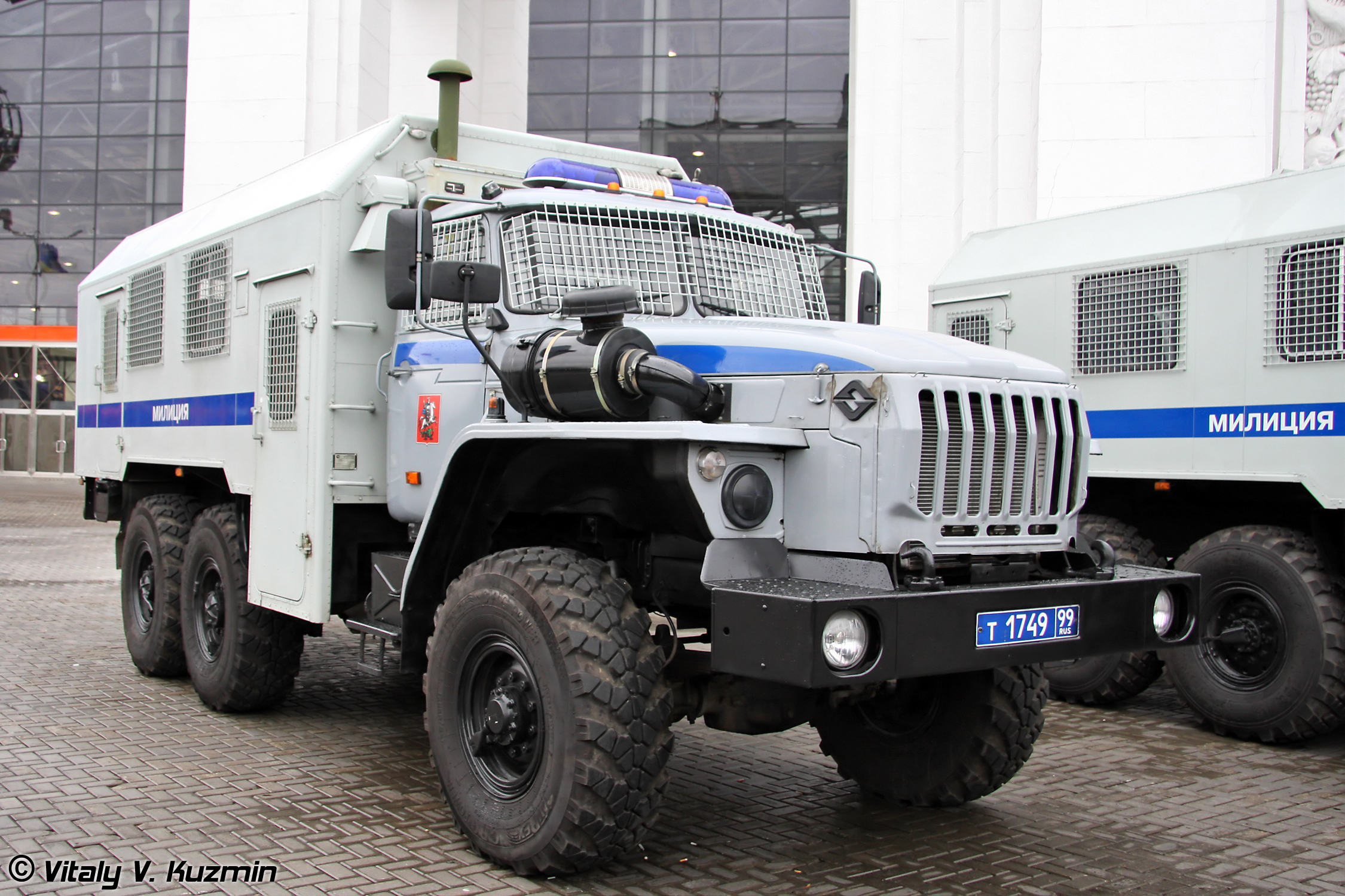 Автомобиль-фургон 572060 для перевозки личного состава, оборудования и снаряжения. Также имеет наименование автомобиль-фургон ВМ-4320 (Automobile-van 572060 also known as VM-4320)